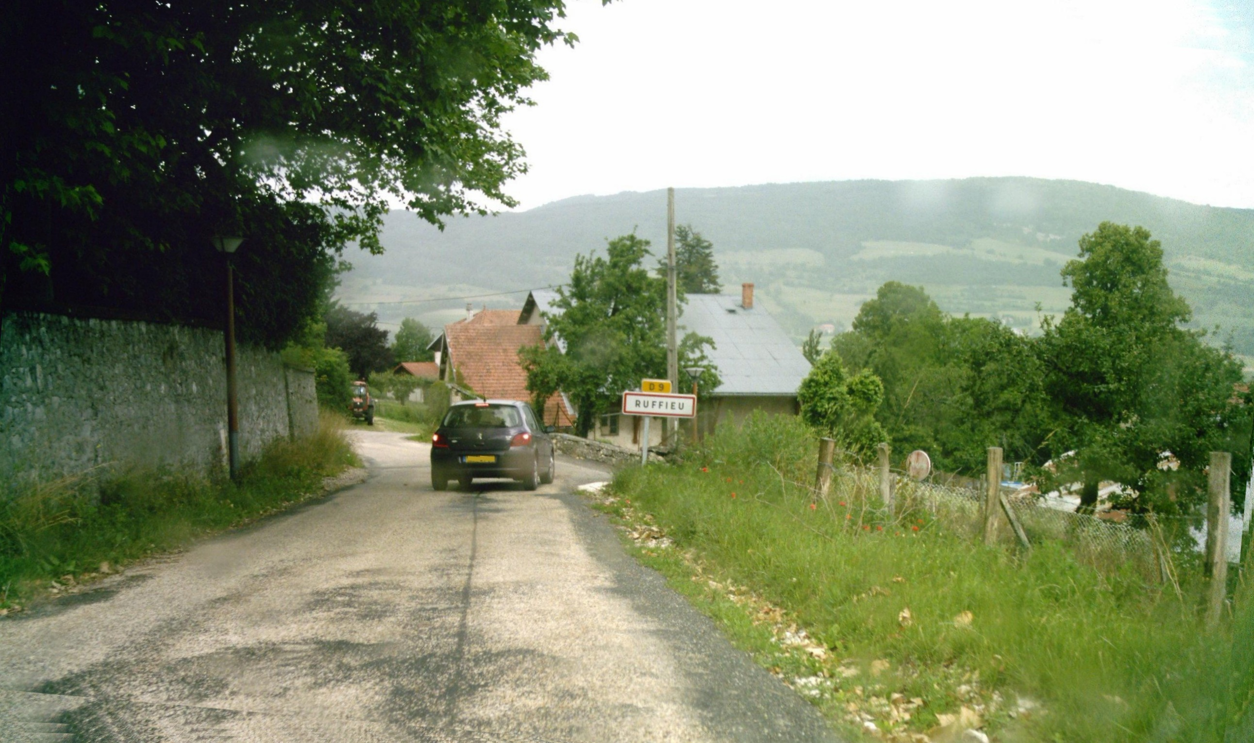 Entrée de la commune de Ruffieu, par la descente du col de la Rochette